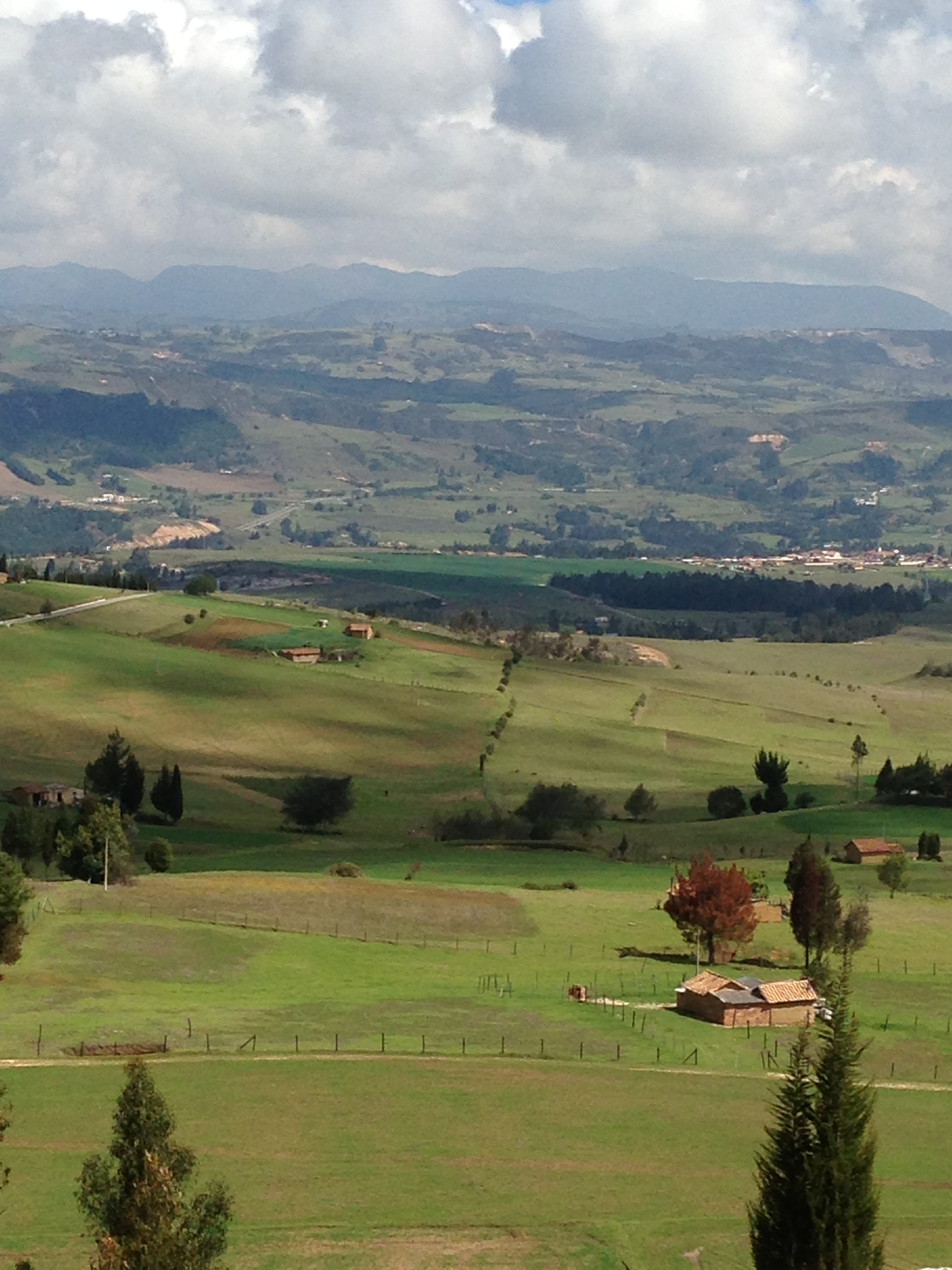 Chivata